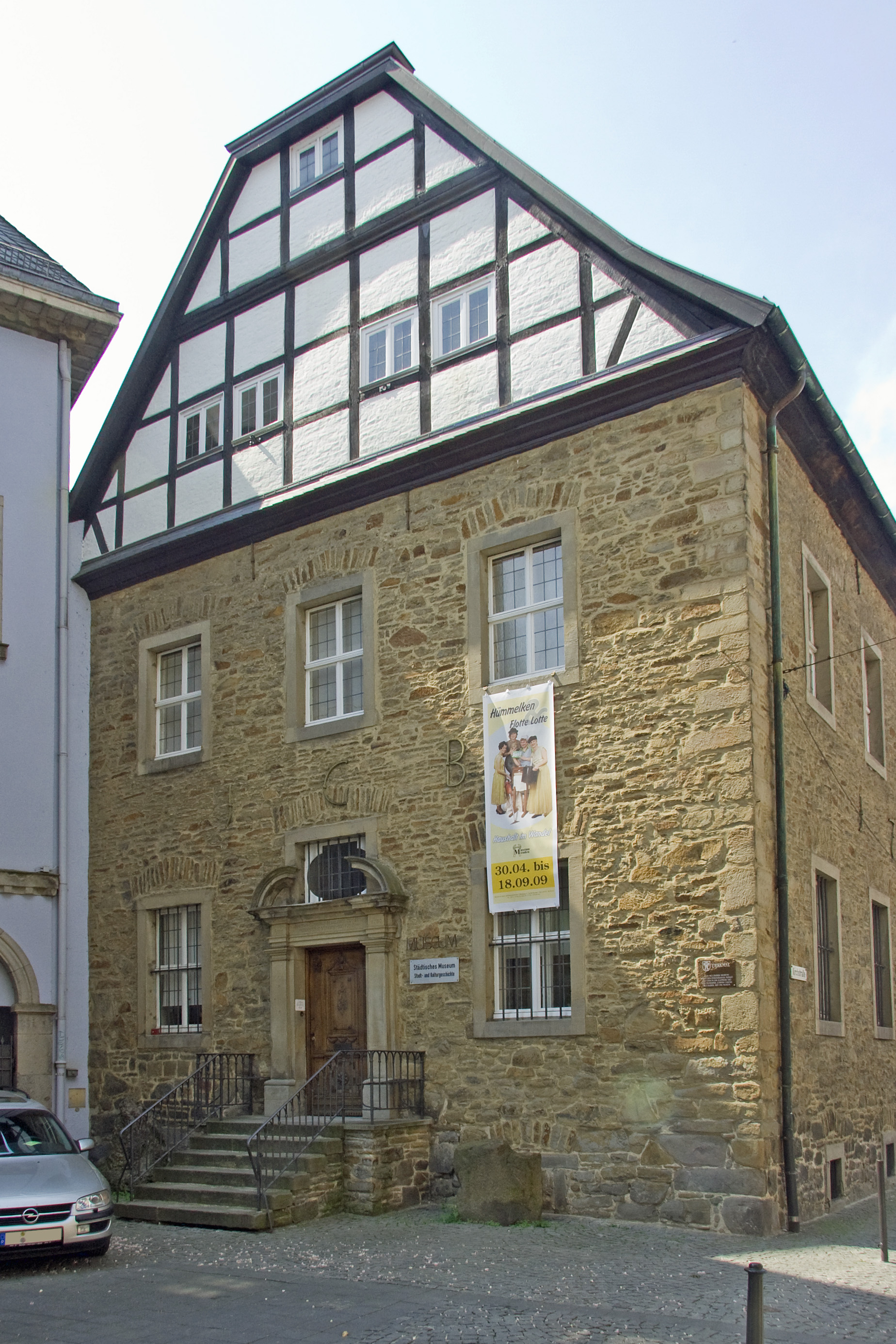 Außenansicht des Stadtmuseums in Menden